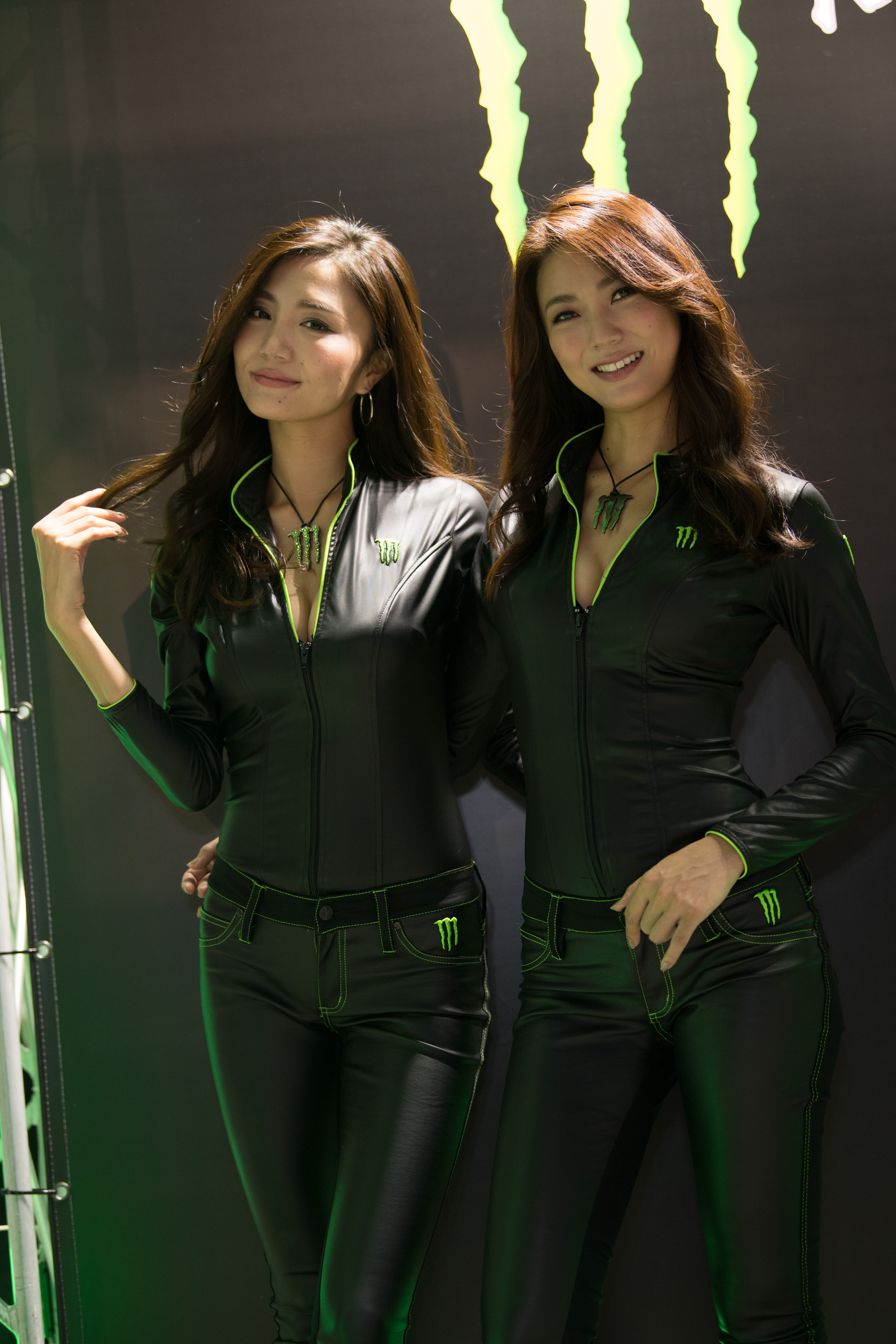 20170922-DSC_2297